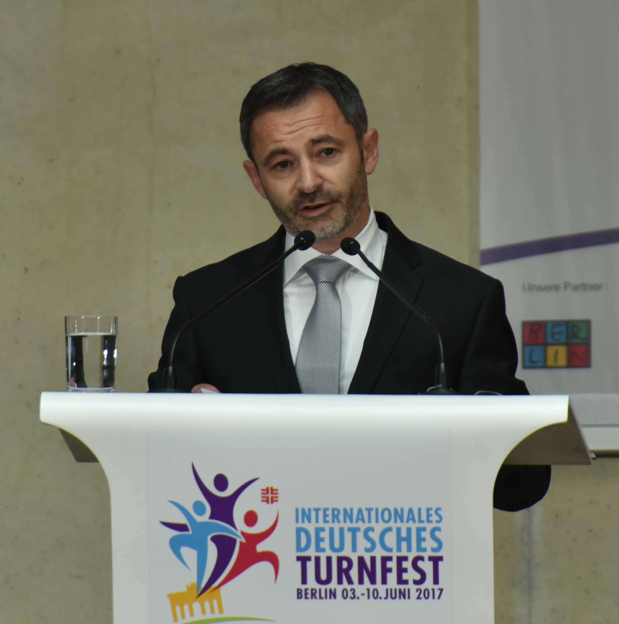 Festakt zum Internationalen Deutschen Turnfest Berlin 2017. Abgebildet: Alfons Hölzl.